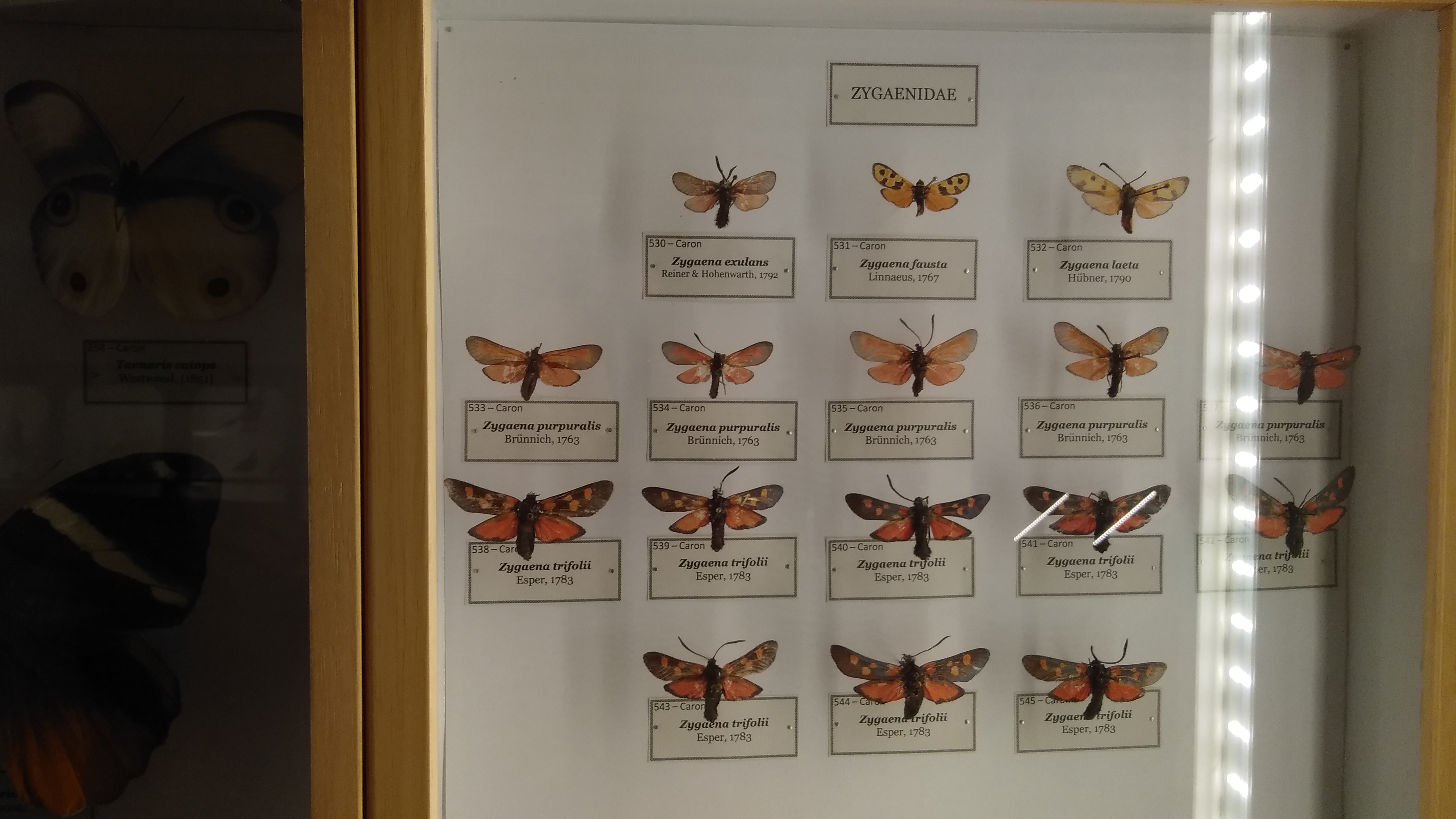 Museo Calderini (Varallo): una cassetta di lepidotteri